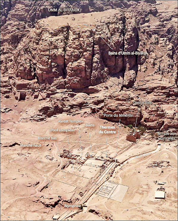 Le centre de la cité de Pétra vue du ciel.